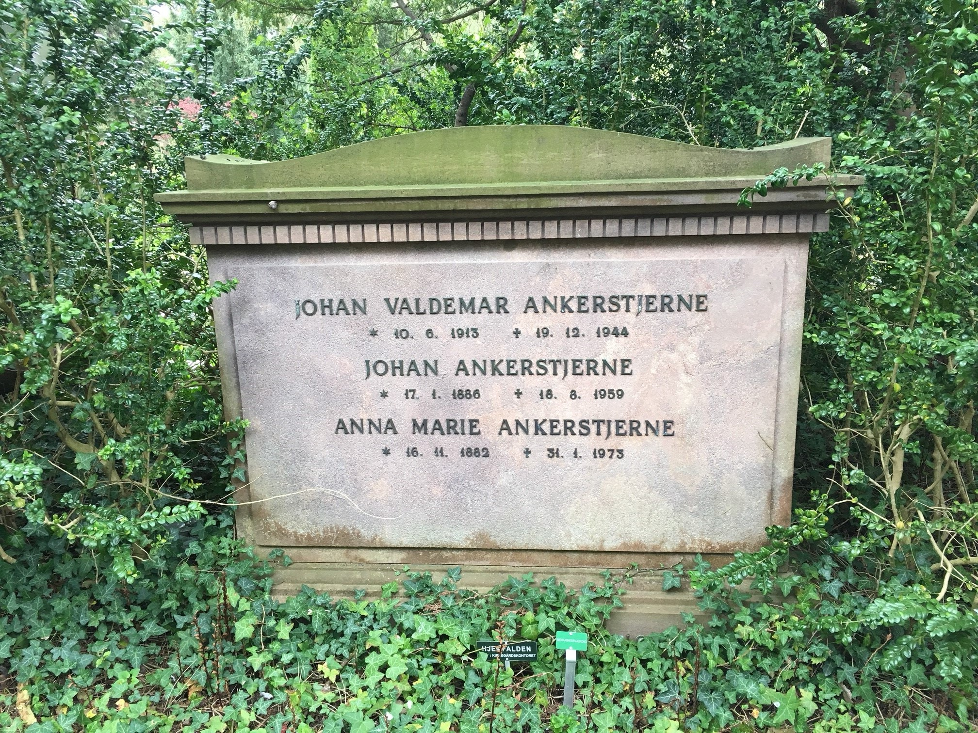 Johan Ankerstjernes gravsted på Vestre Kirkegård